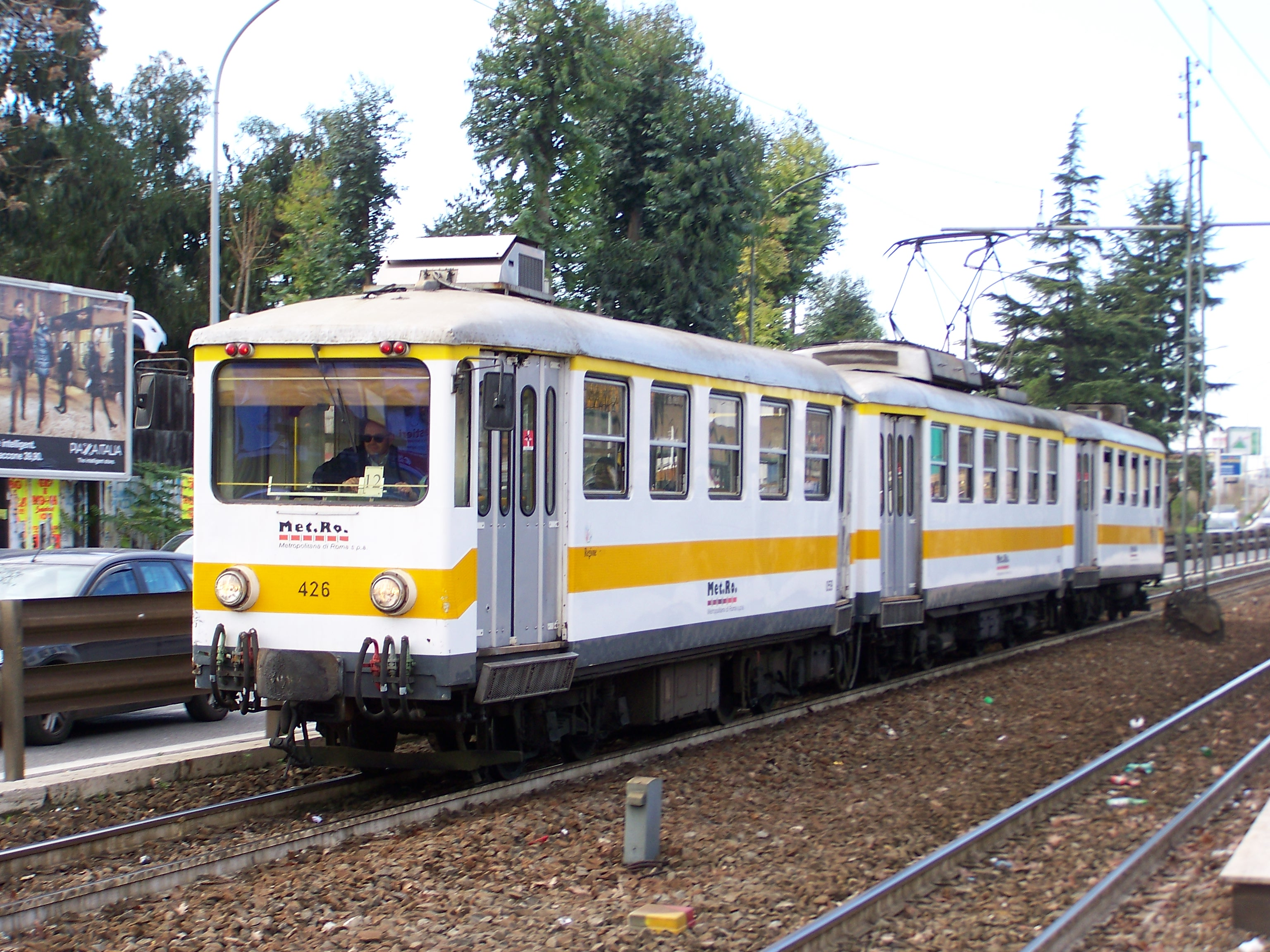 Un Bloccato ex STEFER, convoglio n. 426, in prossimità della fermata di Togliatti della Roma–Giardinetti.